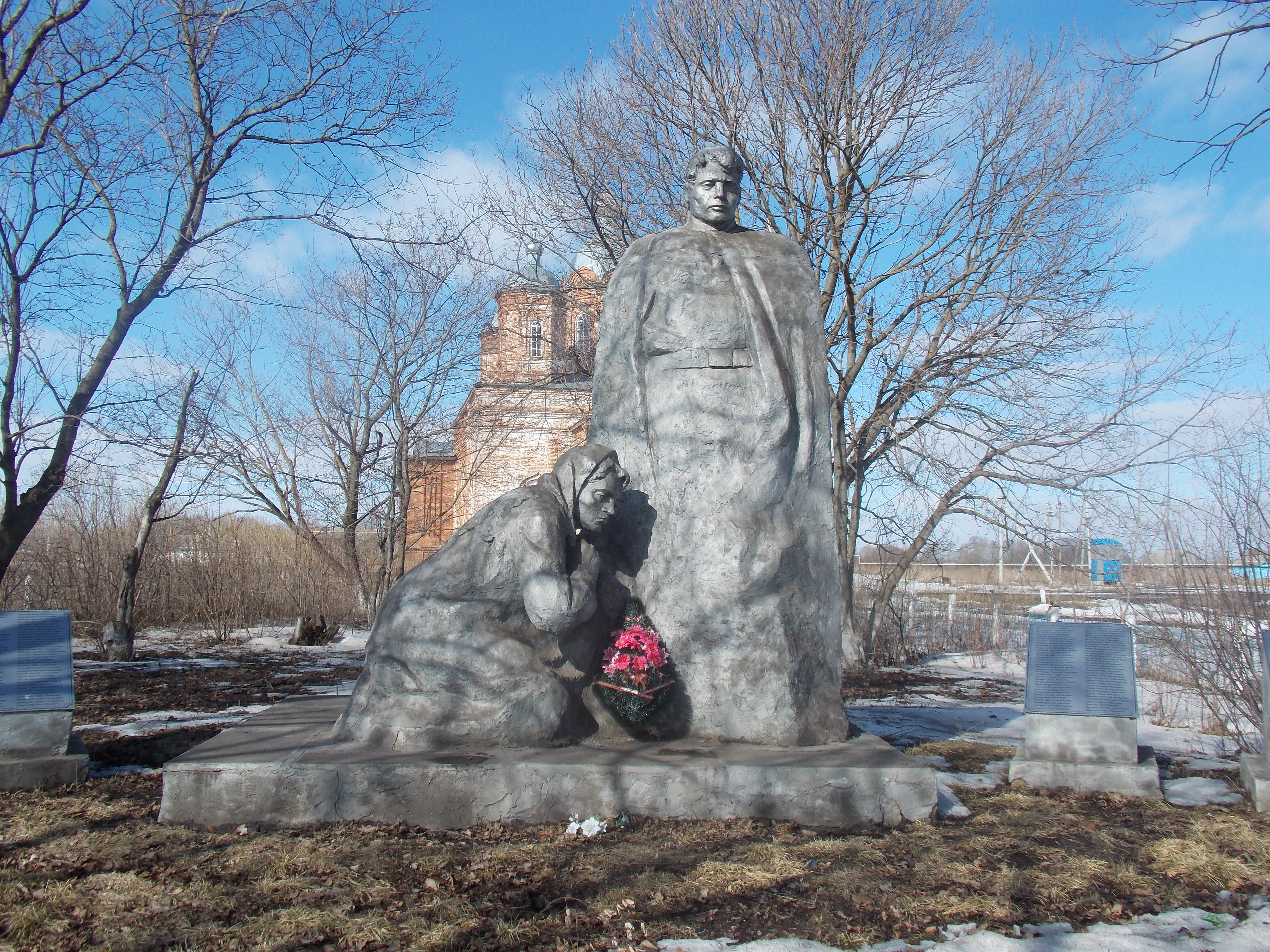 Памятник погибшим войнам в селе Сиалеевская Пятина. На заднем плане Никольская церковь